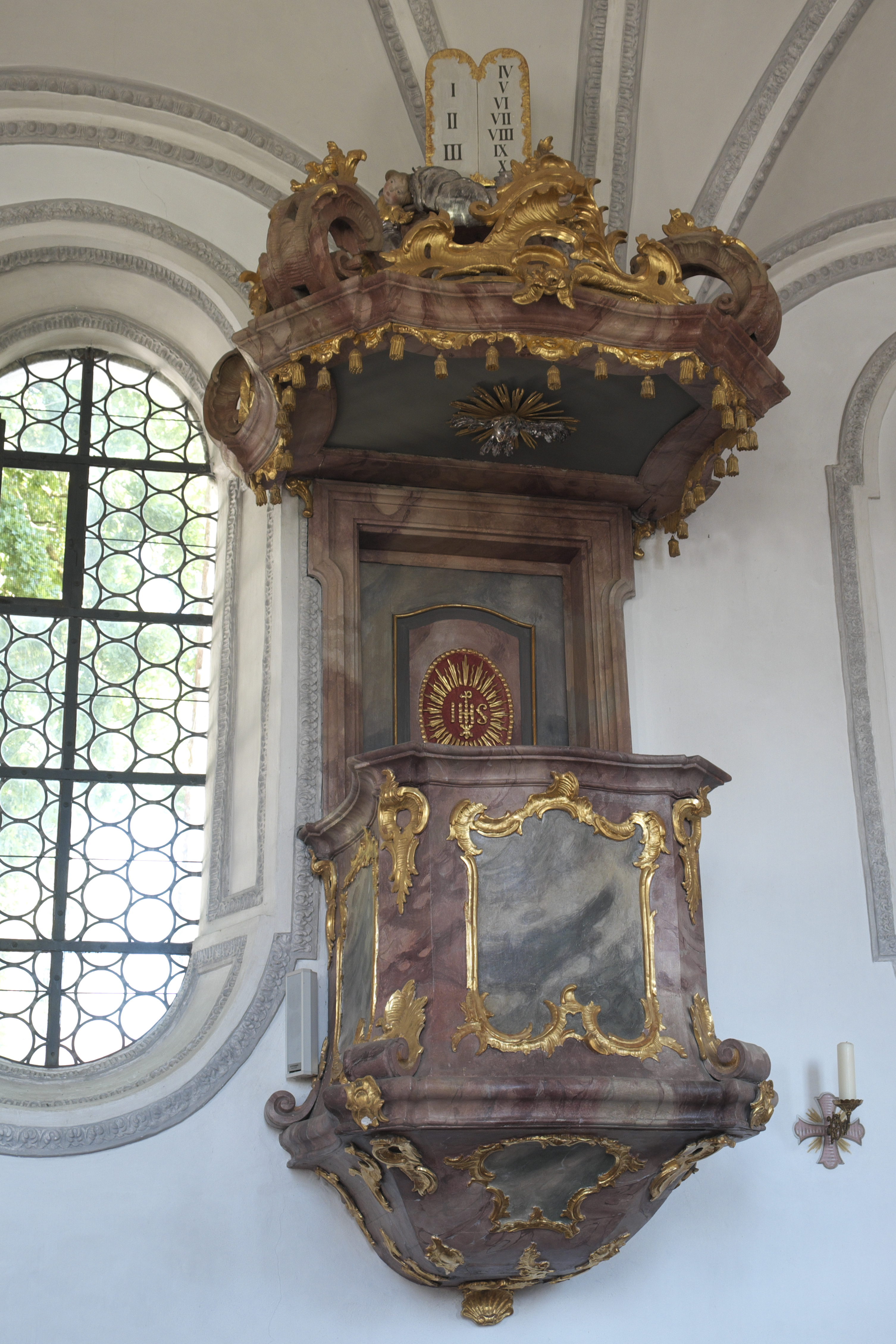 Katholische Pfarrkirche St. Michael in Wenigmünchen (Egenhofen) im oberbayerischen Landkreis Fürstenfeldbruck (Bayern/Deutschland), Rokoko-Kanzel